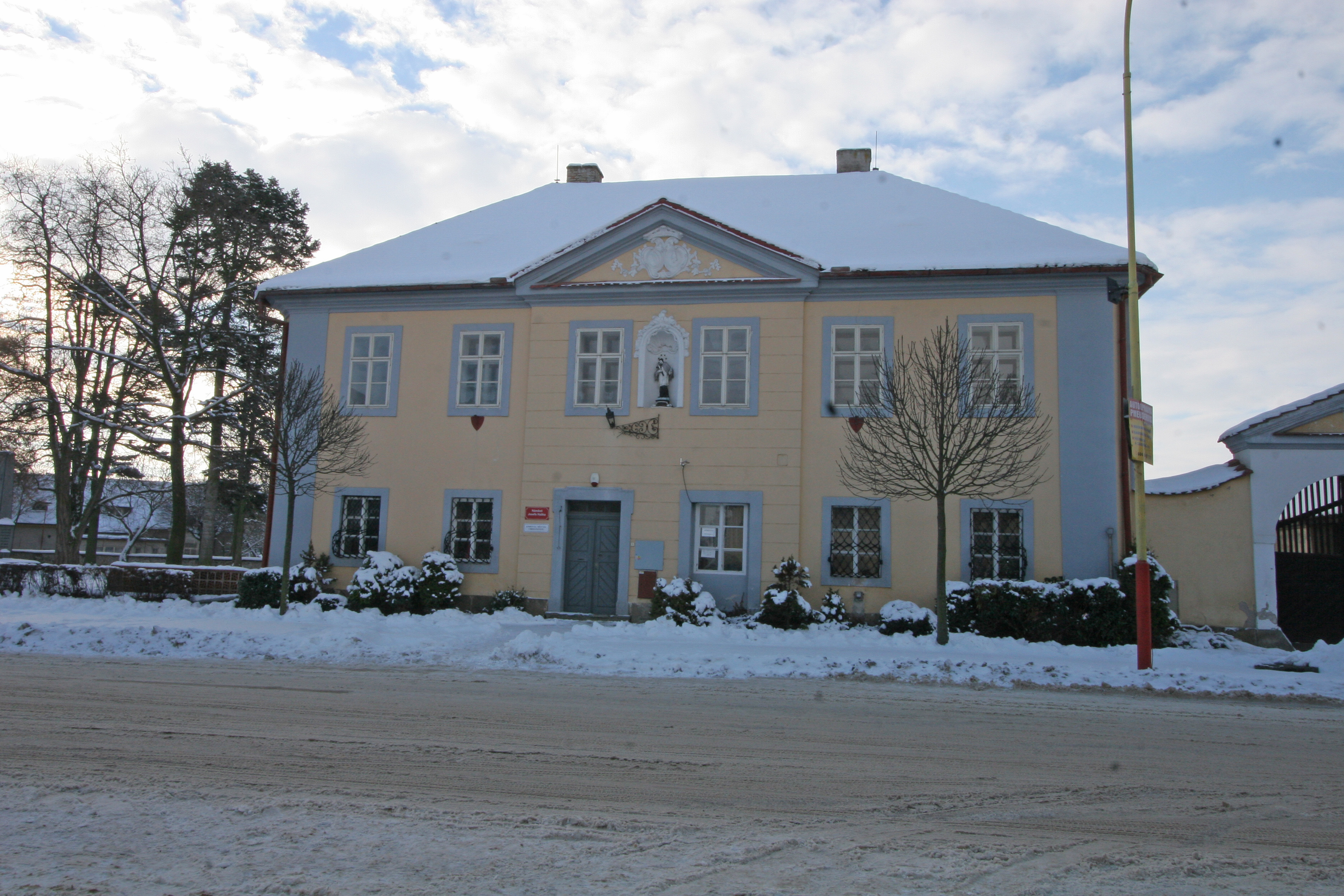 Fara (Chroustovice), Chroustovice 52